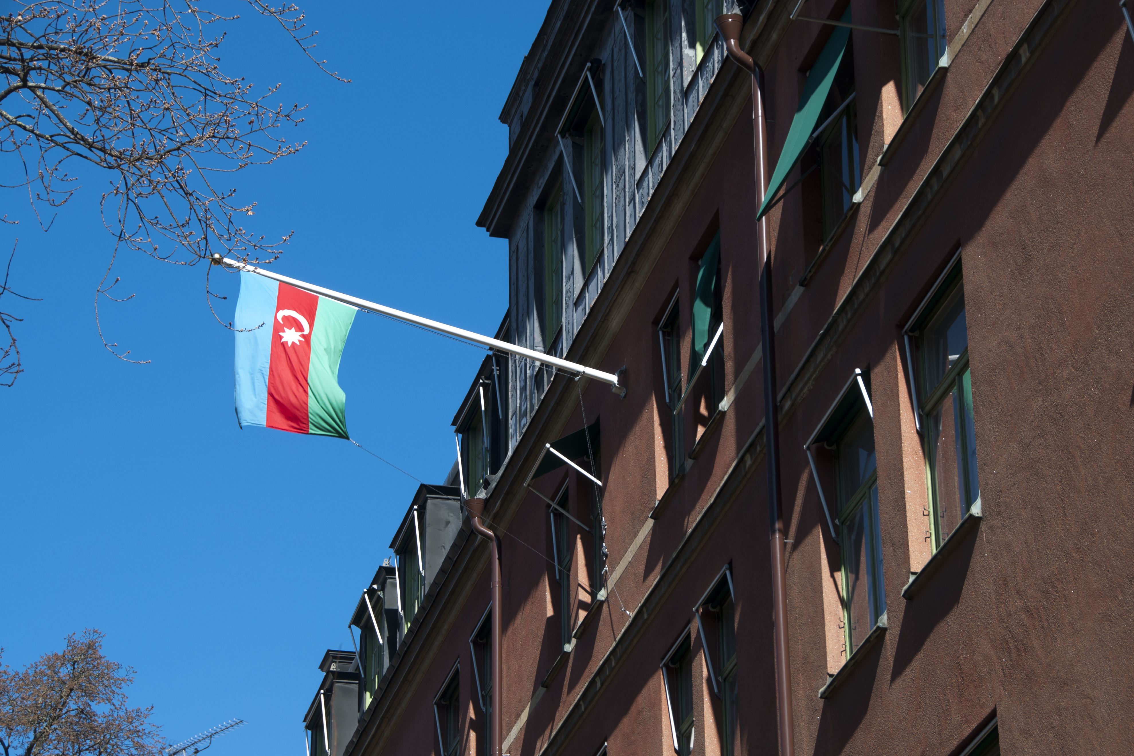 Embassies of Azerbaijan in Stockholm, Barnhusgatan 3